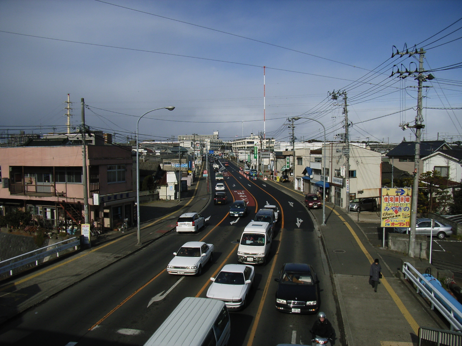 Miyagi Prefectural Road 8, Sendai-Matsushima Line. Sendai, Miyagi prefecture, Japan.